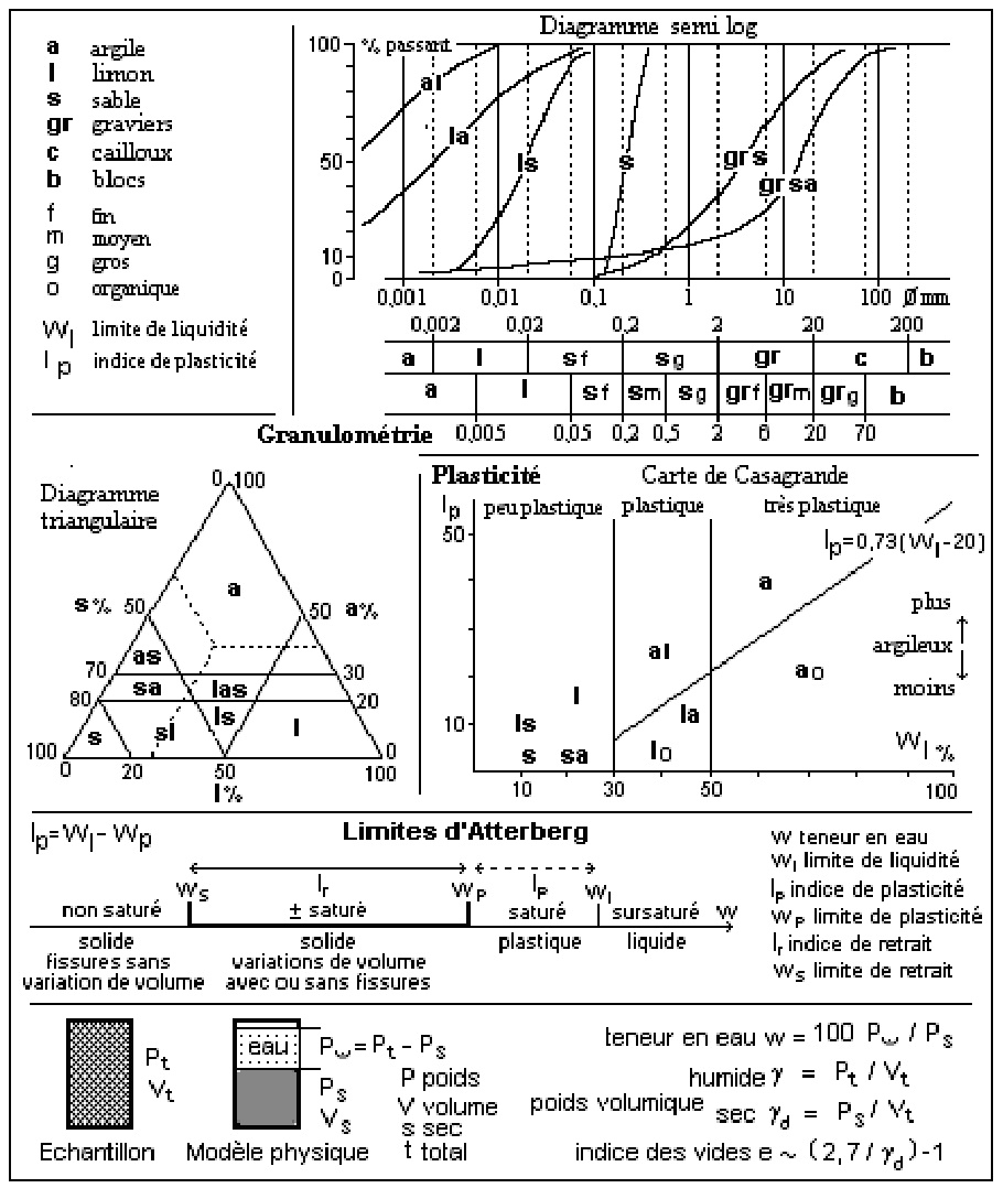 Caractéristiques des sols